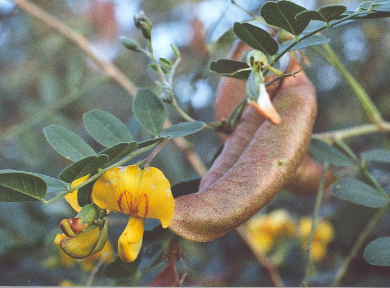 Colutea arborescens